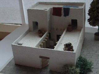 Israëlische vierkamerwoning met pilarenrijen aan weerszijden van de middelste 'kamer' (binnenplaats) en verdieping, ca. 900 v.Chr. Schaal 1 cm = 1 m